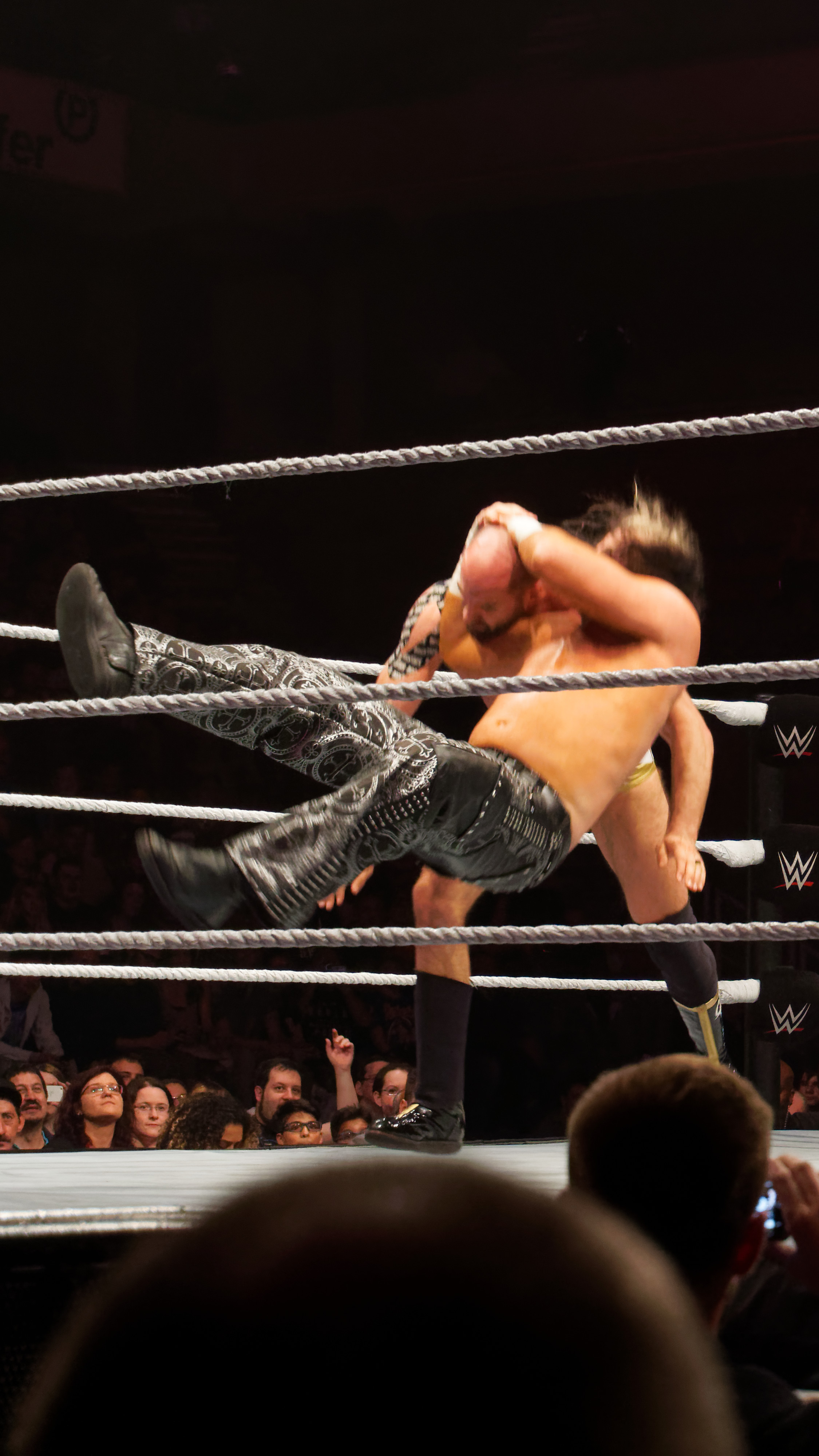 Jeff Hardy (c) & Matt Hardy (c) defeat Big Cass & Enzo Amore, Cesaro & Sheamus (in Triple Threat Match) Info on the match : WWE RAW Tag Team Title ( Le vendredi 12 mai, la WWE Live Tour fera escale au Country Hall a Liege pour le spectacle de catch de l'annee! Au programme: des duels impitoyables et des rencontres captivantes entre les meilleures equipes et les plus grands rivaux. )